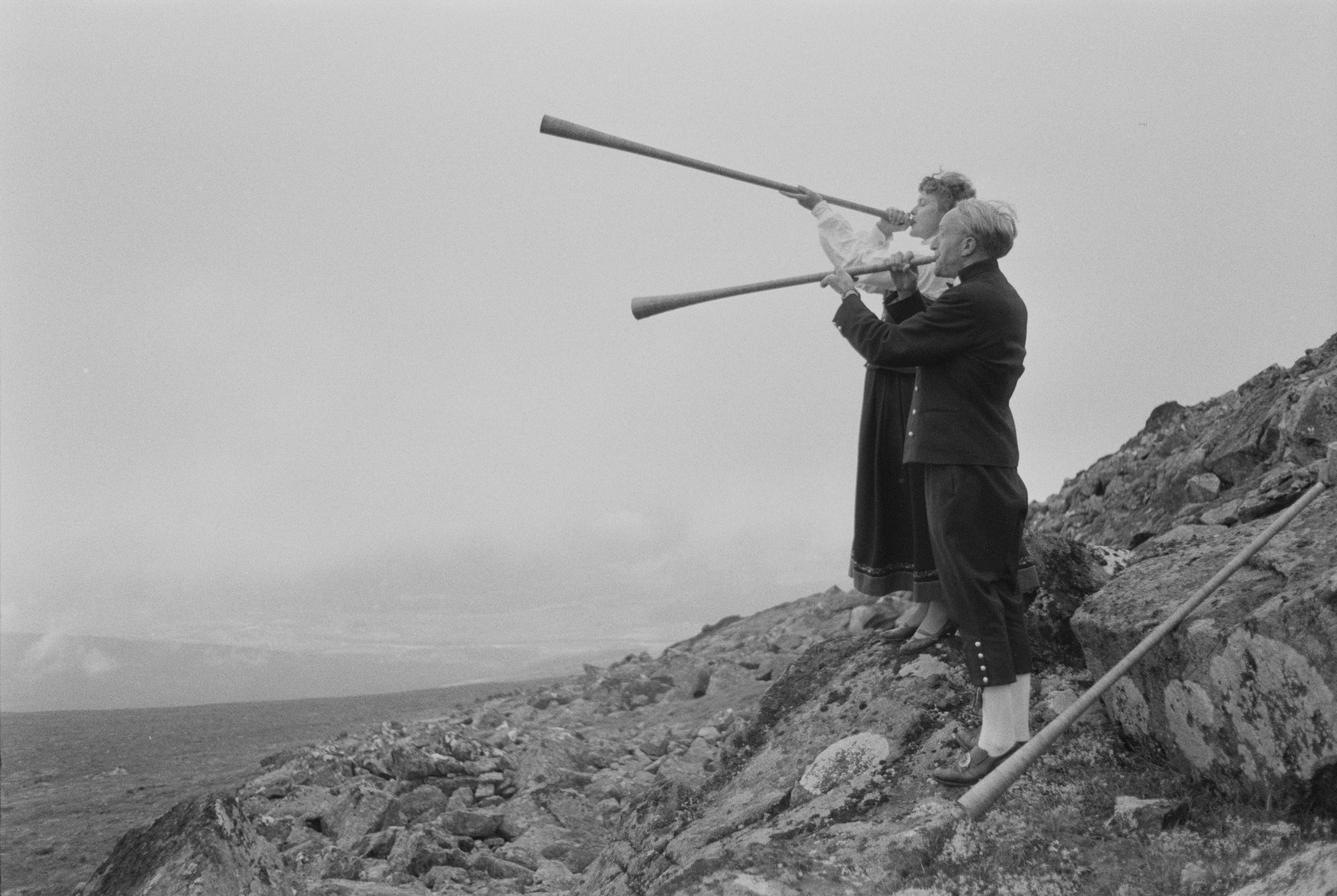 Bildet er hentet fra Arkivverket. Foto tatt i forbindelse med reportasje om den norske filmen Freske fraspark fra 1963. Manus var ved Kjell Aukrust og Bjørn Breigutu. Regi ved Bjørn Breigutu. Kjell Aukrust, Leif Juster, Turid Caldwell, Alfhild Hovdan, Per Bistrup, Lalla Carlsen Arkivinstitusjon : Riksarkivet Arkivnavn : Billedbladet NÅ Sted : Norge, Hedmark, Alvdal, Emneord: Film, Filminnspilling Avbildet